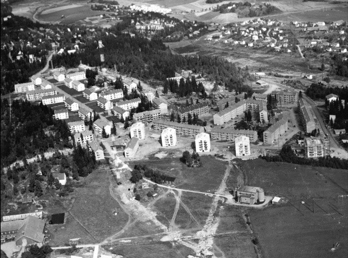 Flyfoto av bydelen Lambertseter, Oslo. Ca 1960